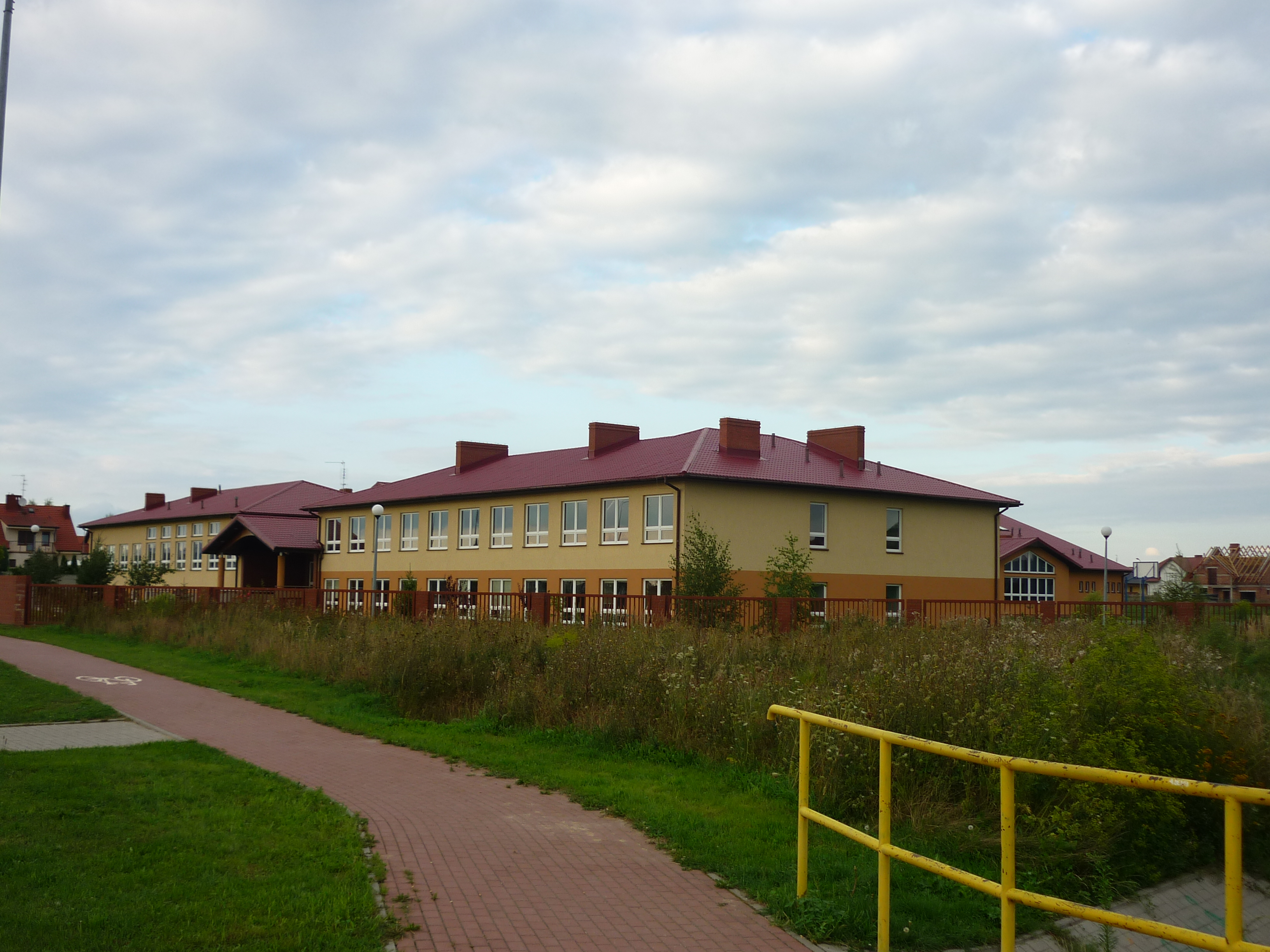 Zalasewo